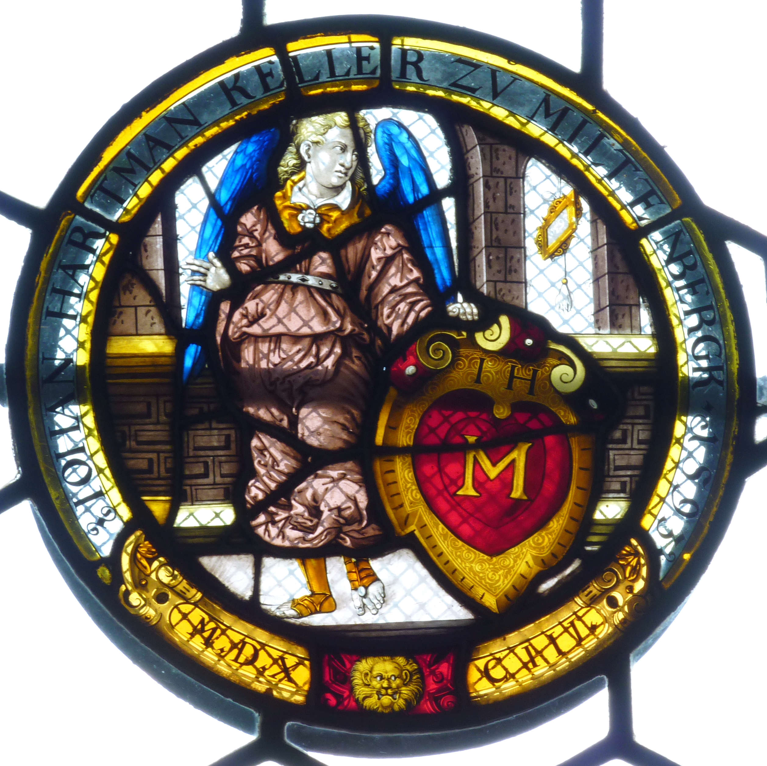 Rathaus in Bürgstadt im Landkreis Miltenberg (Bayern, Deutschland), Wappenscheibe im Sitzungssaal für Johann Hartmann